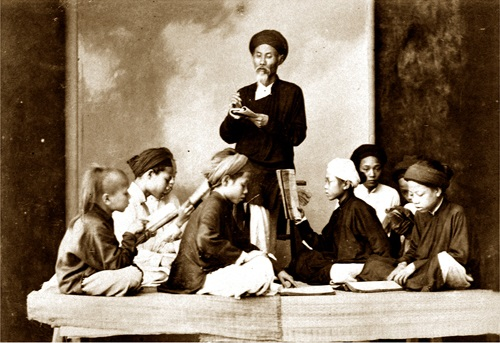 Một lớp học tại tư gia ở Việt Nam vào khoảng năm 1895. Họa sĩ Lê Huy Miến đã dựa theo ảnh này để vẽ bức tranh sơn dầu Bình văn.